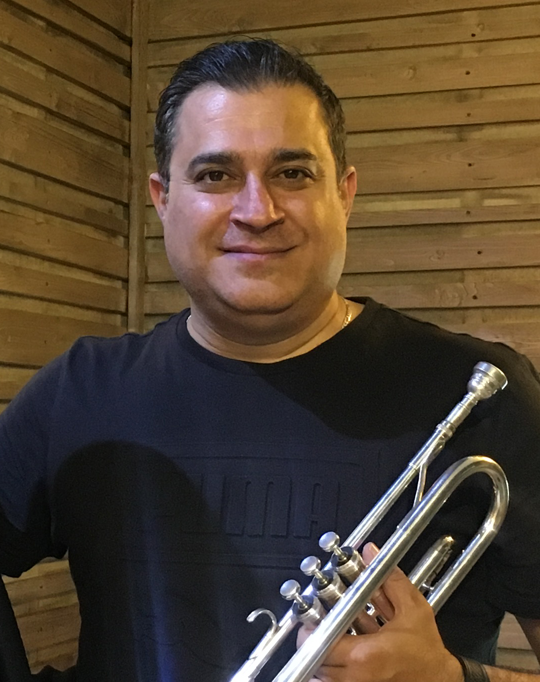 حسن فراهانی - استودیو مدرن تهران ۱۰ خرداد ۱۳۹۸